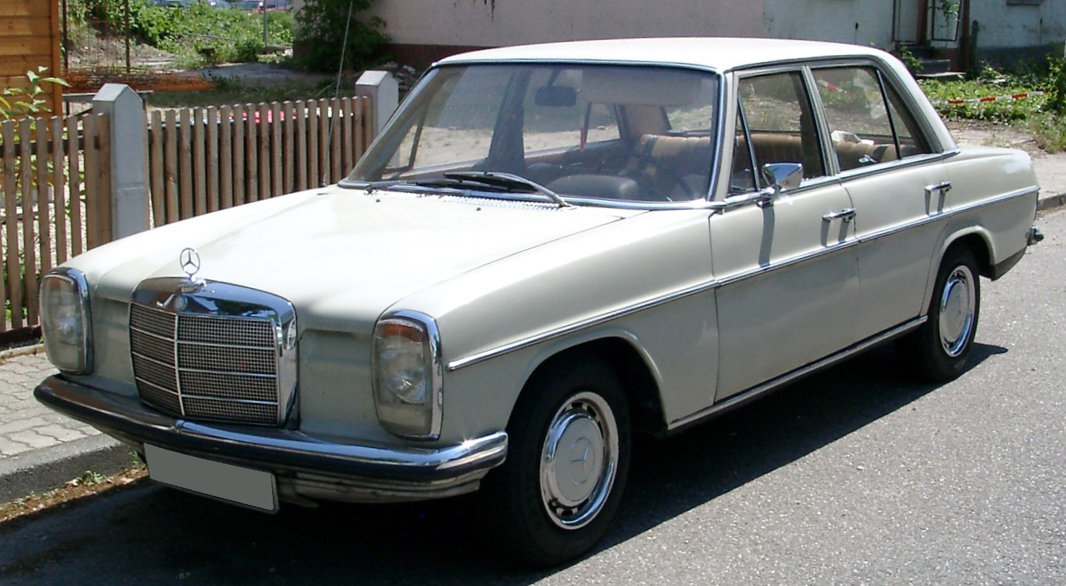 Mercedes-Benz W115